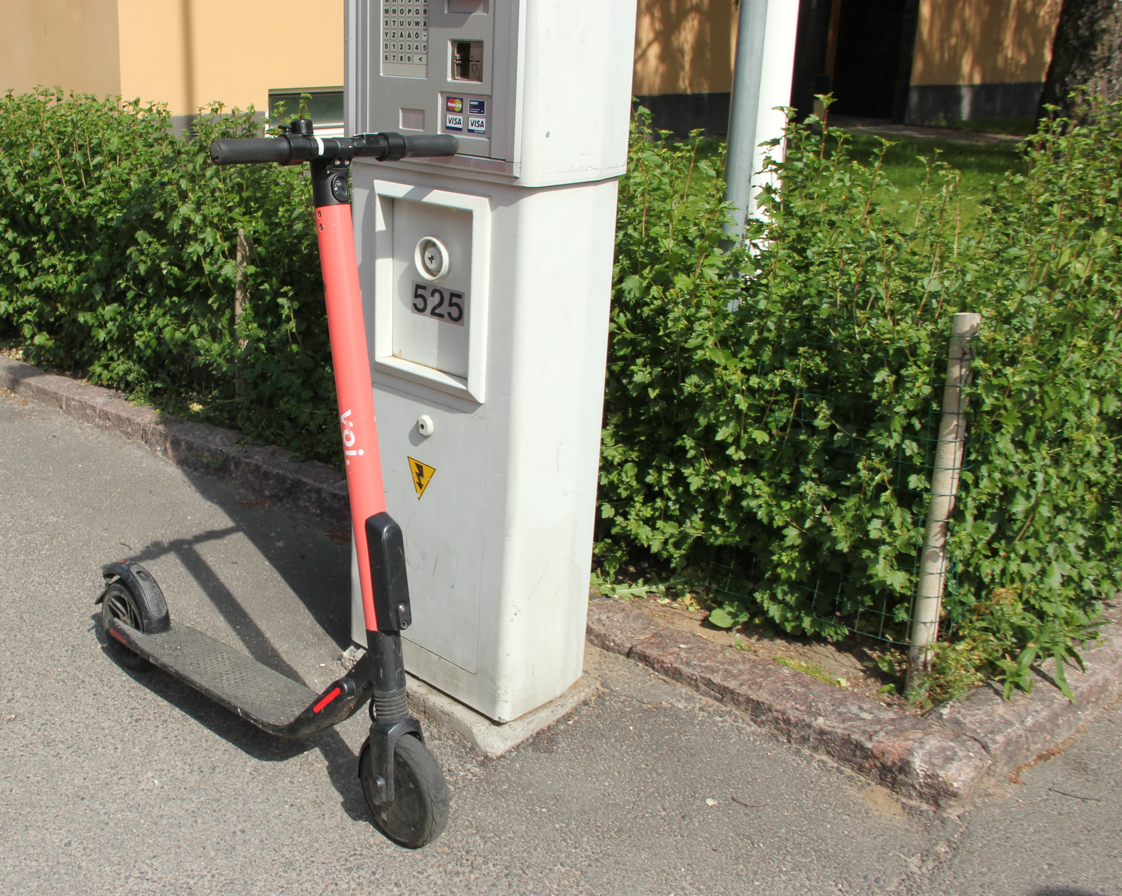 Sähköpotkulauta Voi Helsingissä Jalavatiellä pysäköintiautomaatin viereen jätettynä.